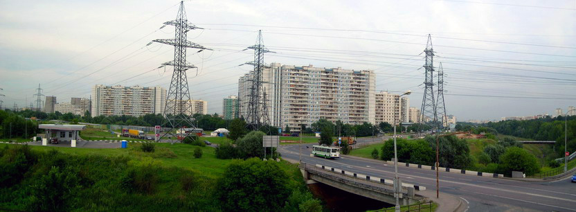 Микрорайон Бусиново в Москве